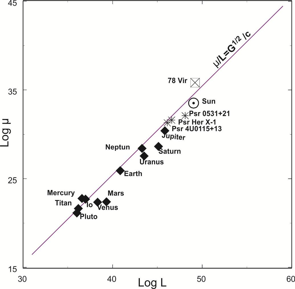 Набюдаемые значения магнитных моментов космических тел в зависимости от их моментов вращения. Прямая линия - эффект, связанный с ГИЭП.